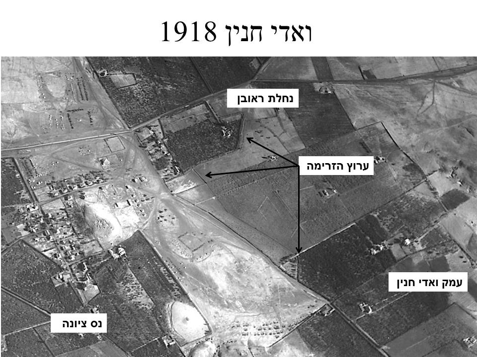 קטע מתצלום אוויר שצולם ע"י הטייסת הבווארית שבו מצולם ואדי חנין